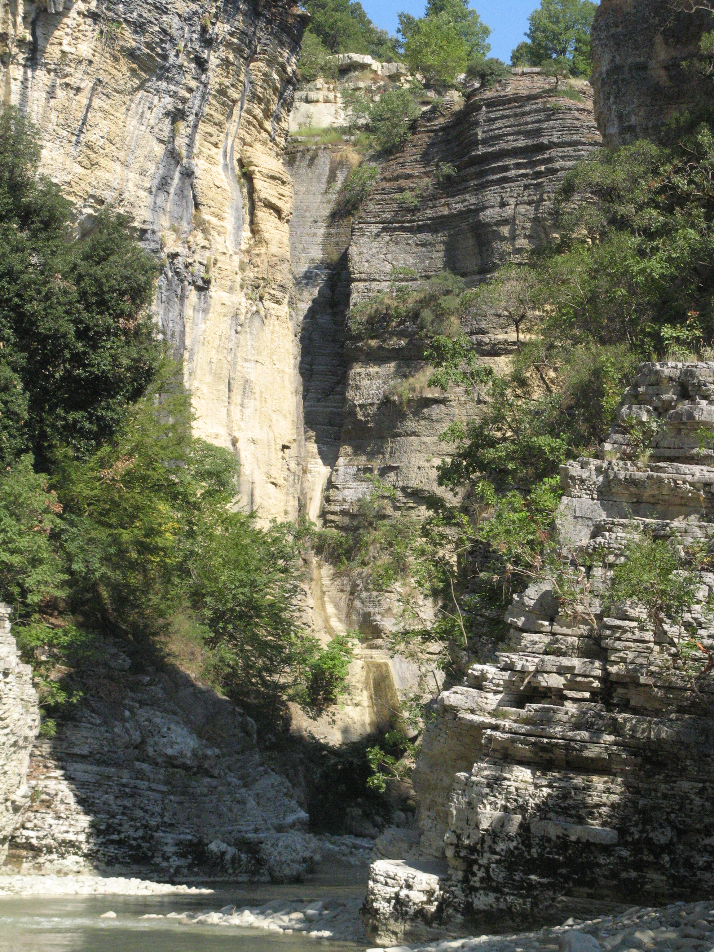 Osumit - Upper Canyon